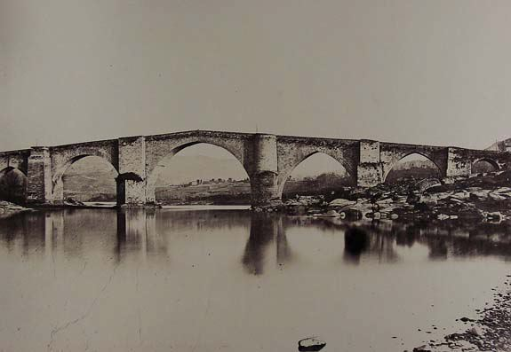 Ponte Maior de Ourense fotografiada por Jean Laurent no século XIX.